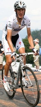 Армстронг, Шлек, Контадор и Бассо взбираются в гору на 9-м этапе Тур де Франс 2010